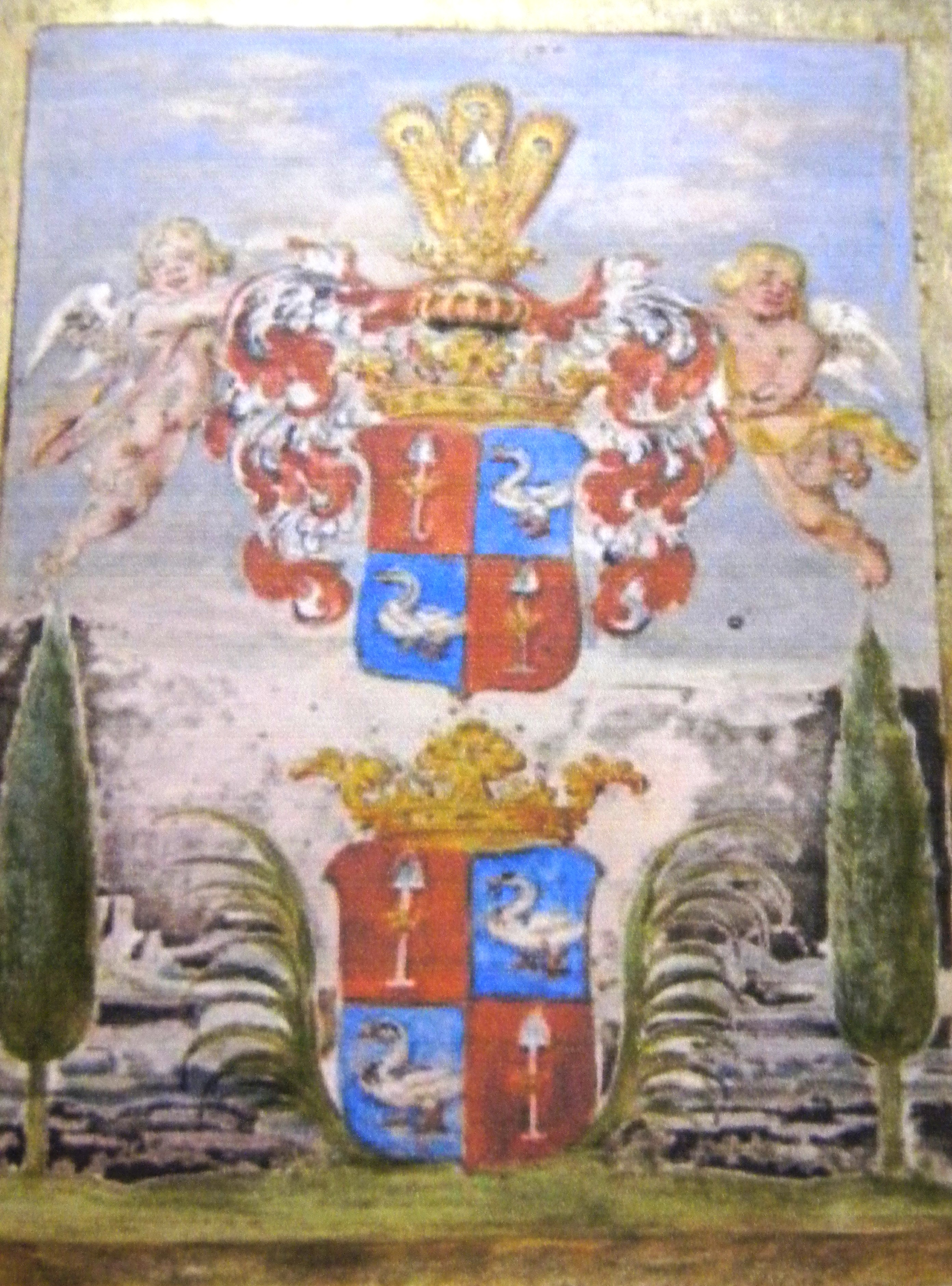 Wapen van het geslacht De Graeff. Österreichisches Staatsarchiv: AT-OeStA/AVA Adel RAA 151.23 Graeff, Andreas de, Bürgermeister zu Amsterdam, Verleihung des Reichsritterstandes, „Edler Herr von Graeff, Ritter”, Wappenbesserung, 1677.07.19 (Akt (Sammelakt, Grundzl., Konvolut, Dossier, File))